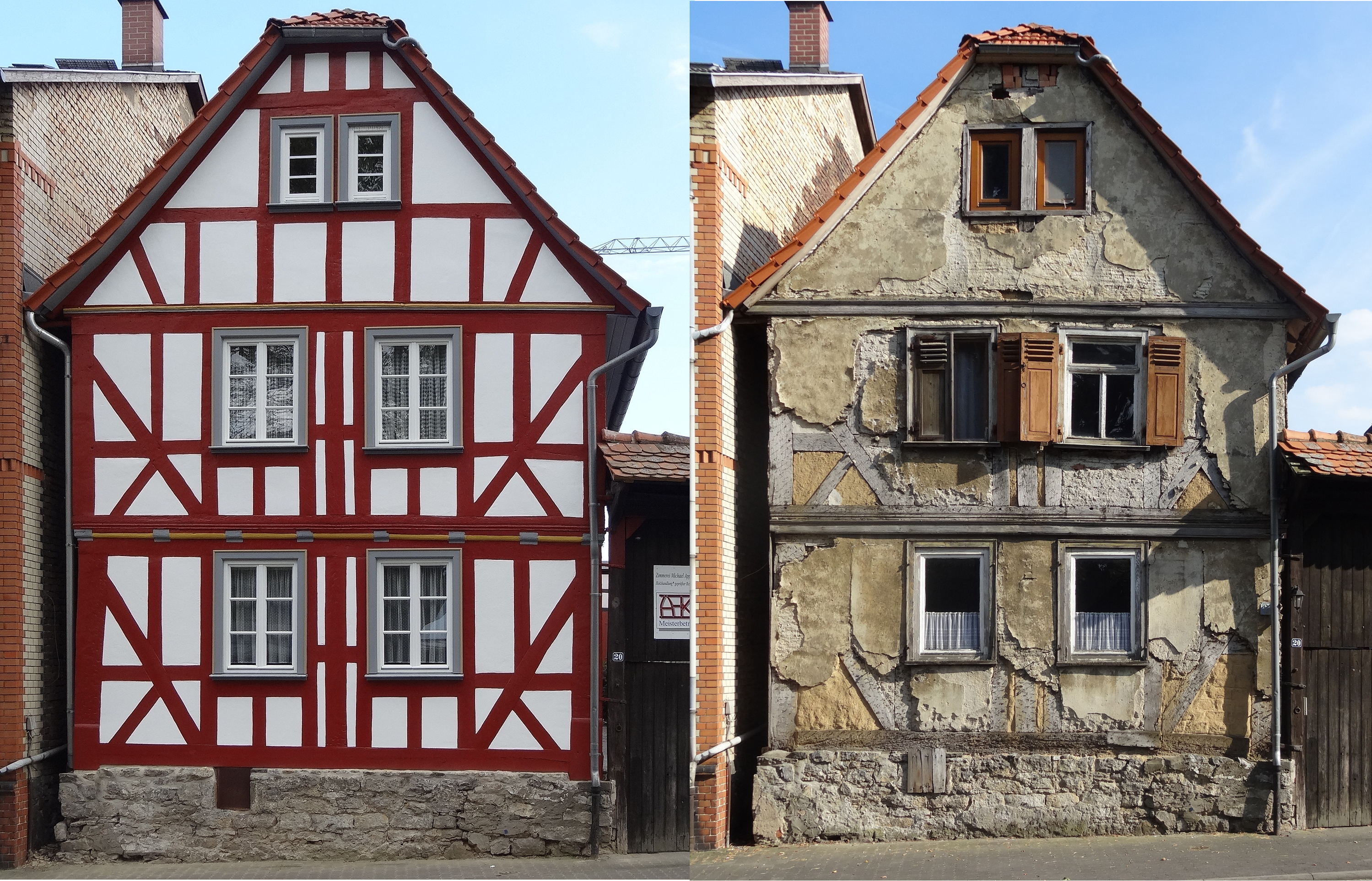 source: File:Obergasse 20 (Lang-Göns) 05.JPG by me & File:Obergasse 20 (Lang-Göns) 1.JPG by me